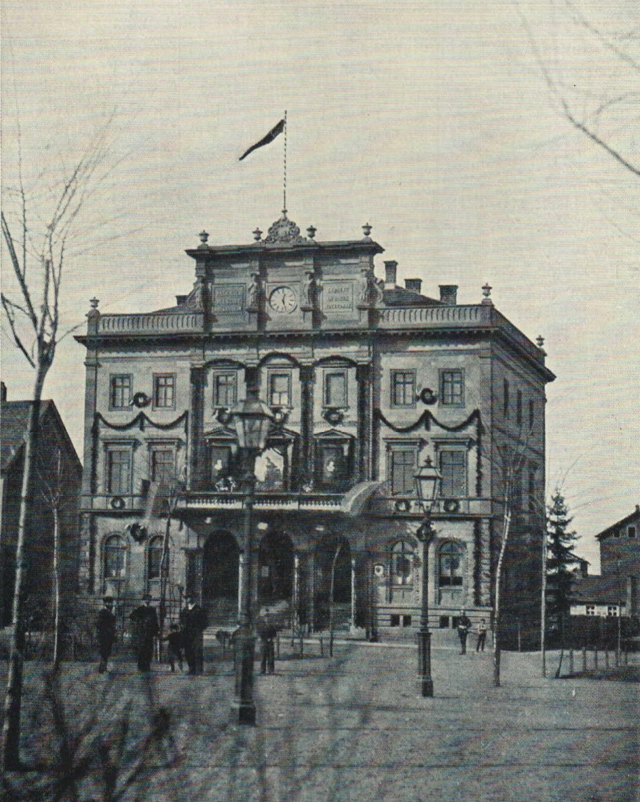 Frankfurt-Bockenheim; Erbaut 1869, drei Jahre nach Besetzung Kurhessens durch das Königreich Preußen in der Kurfürstenstraße 36 Ecke Schwälmer Straße im repräsentativen Stil mit klassizistischen Formelementen, wie Portikus, Balkon und hoher, mit einer großen Uhr geschmückten Attika. Der Bau sollte den Kurfürstenplatz als neuen Marktplatz der damaligen aufstrebenden Stadt Bockenheim verfestigen. Die davor errichtete Brunnenanlage wurde erst 45 Jahre später errichtet. Das historische Foto von 1871 zeigt das Rathaus der Stadt Bockenheim im feierlichen Fahnenschmuck anläßlich des Sieges im Deutsch-Französischen Krieg. 26 Jahre später wurde durch die Eingemeindung Bockenheims 1895 die Rathausfunktion absolet. Man installierte hier ein Fürsorgeamt, später auch eine Jugendberatungsstelle. 75 Jahre nach der Errichtung wurde 1944 das Gebäude durch amerikanische Bombentreffer zerstört. Auf dem Grundstück wurde in der Nachkriegszeit eine Feuerwache sowie von der Saalbau Frankfurt das Bürgerhaus Bockenheim errichtet.